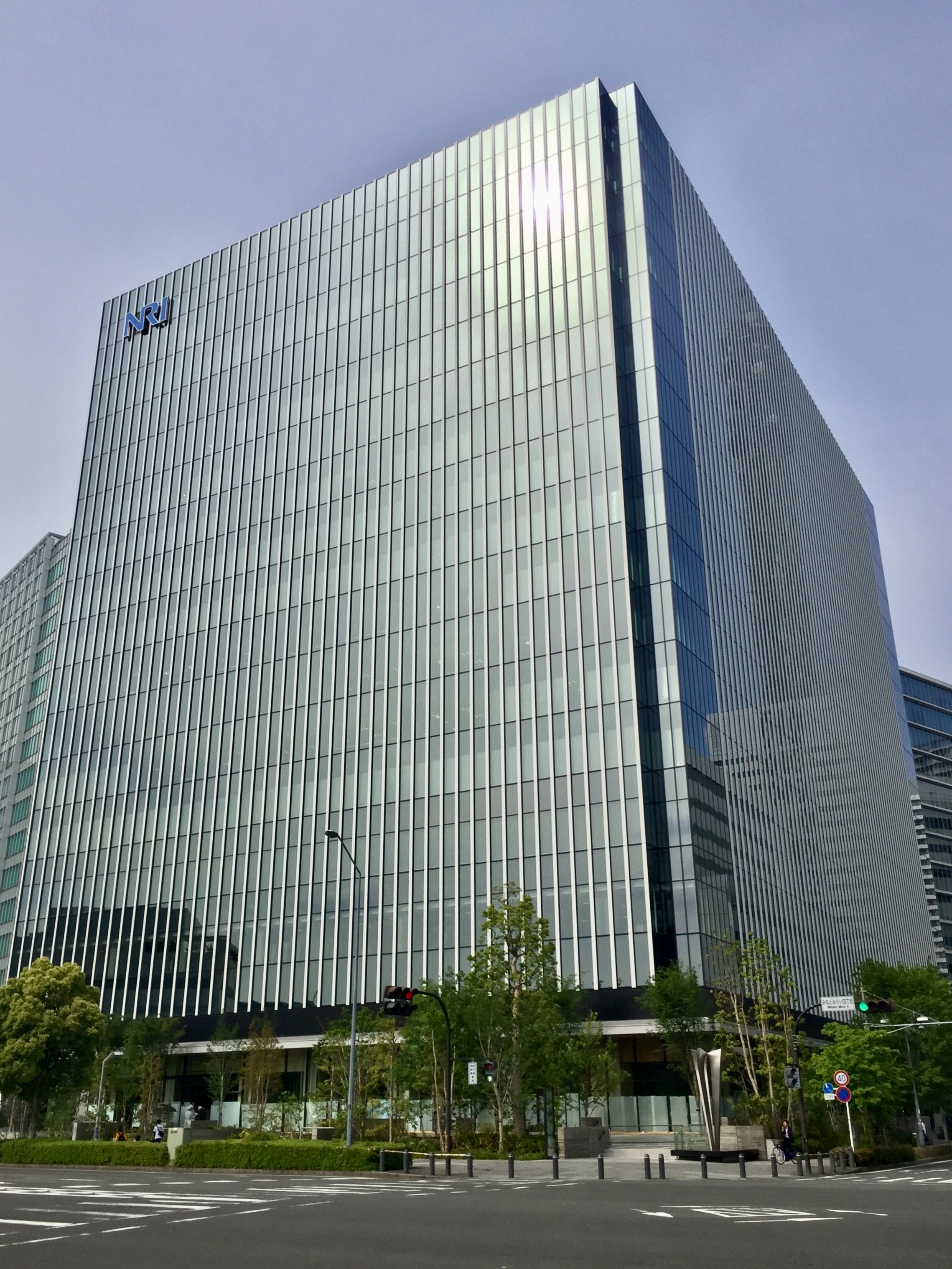 みなとみらい地区46街区のオフィスビル「横浜野村ビル」の外観（南西・みなとみらい大通り側）。